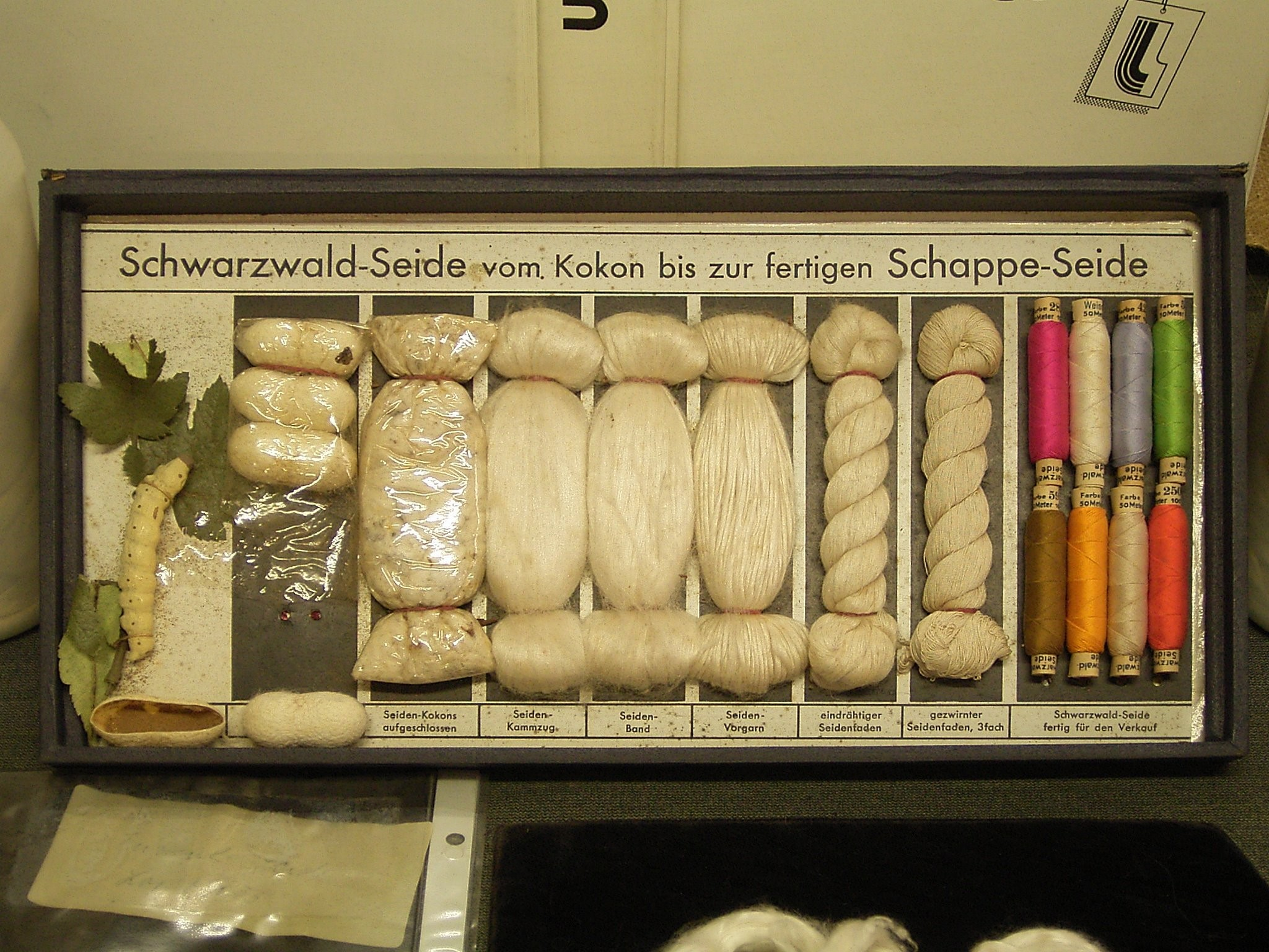 Wülfing-Museum in Radevormwald-Dahlerau